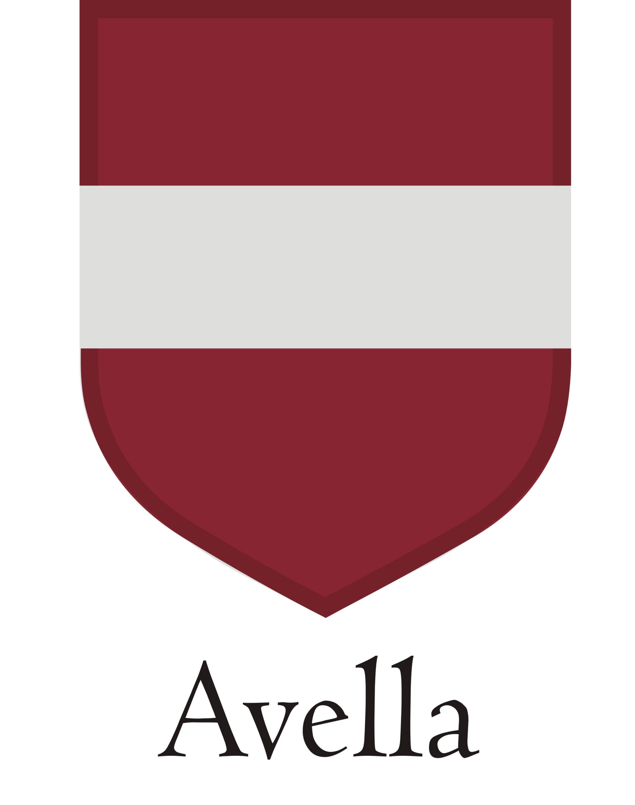 Brasão familia Avella